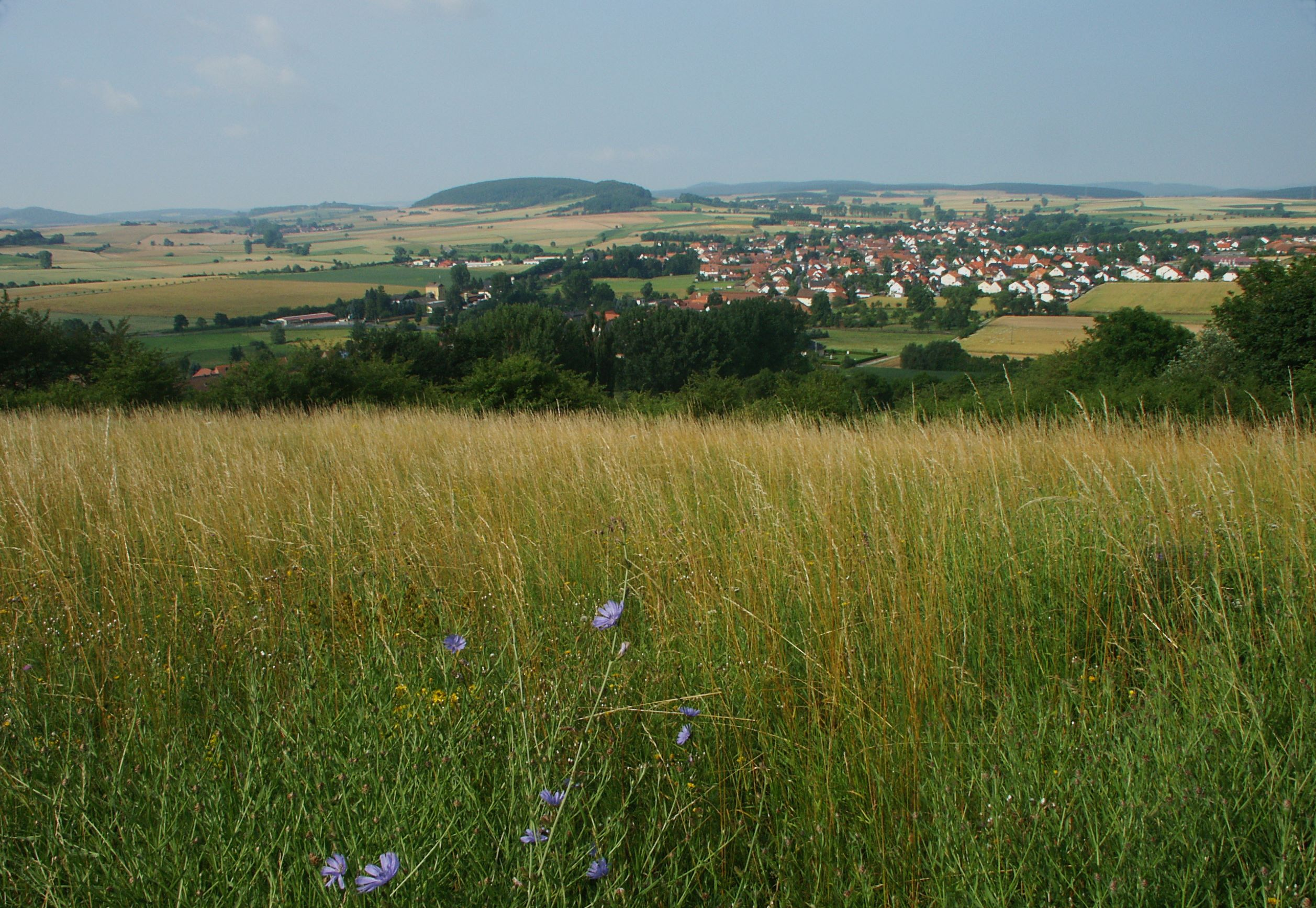 Schenklengsfeld von den Hängen des Landecker Berges aus. Die Anhöhen im Hintergrund gehören zu den nordwestlichen Ausläufern der Rhön um Eiterfeld.